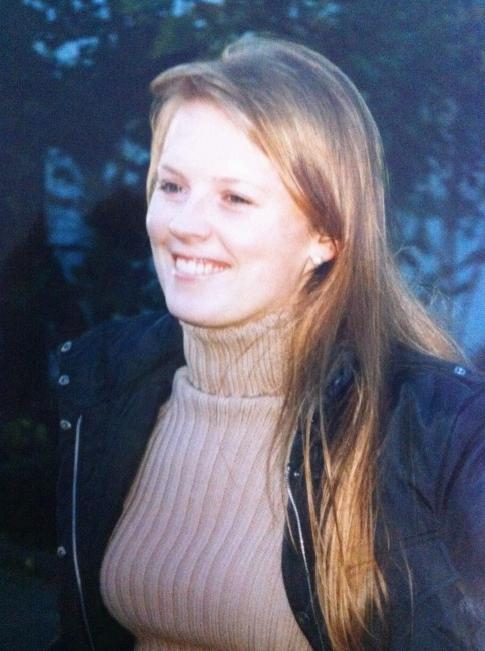 Patricia Kelly